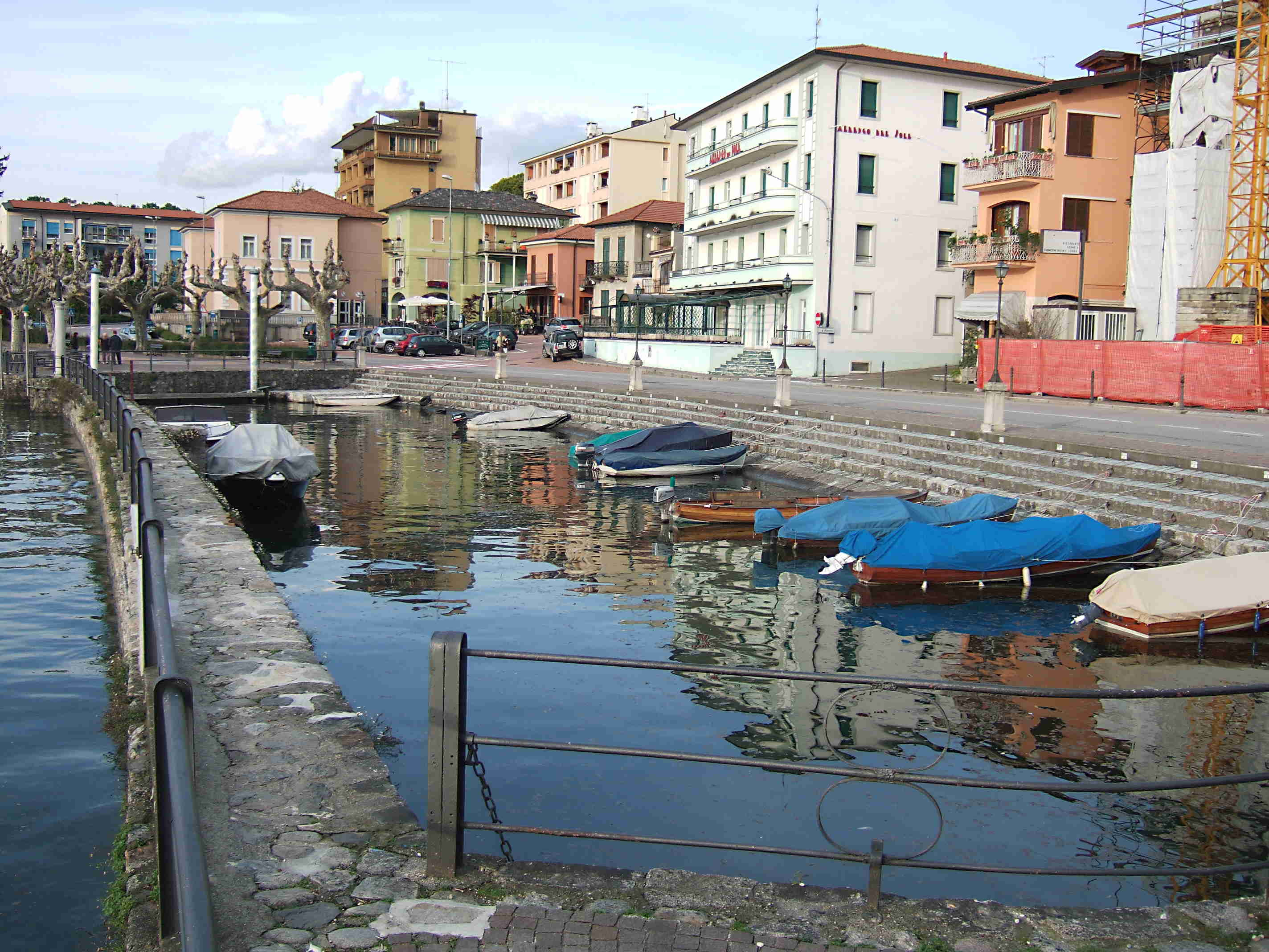 View of Porto Valtravaglia